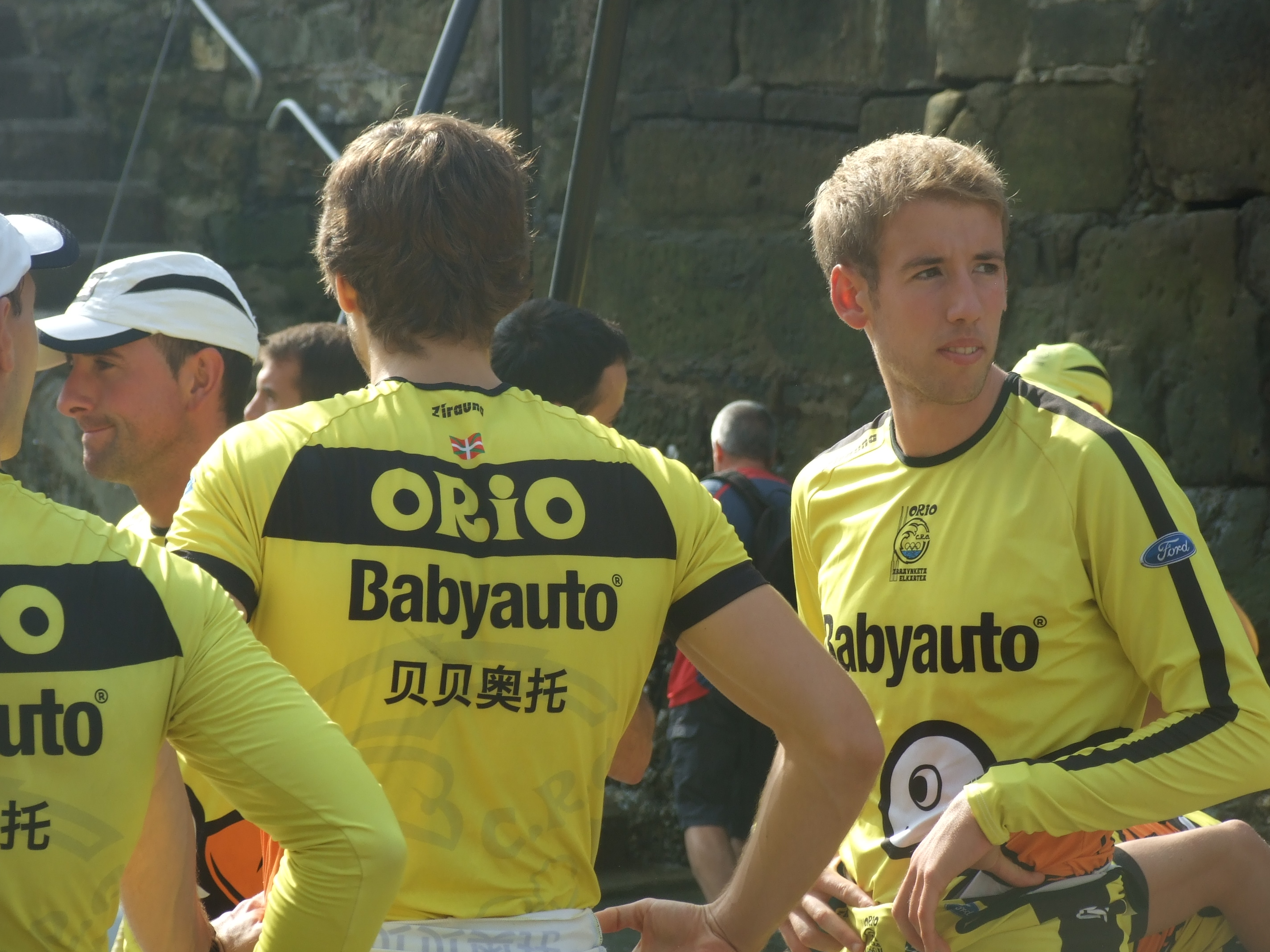 Bandera de la Concha 2016